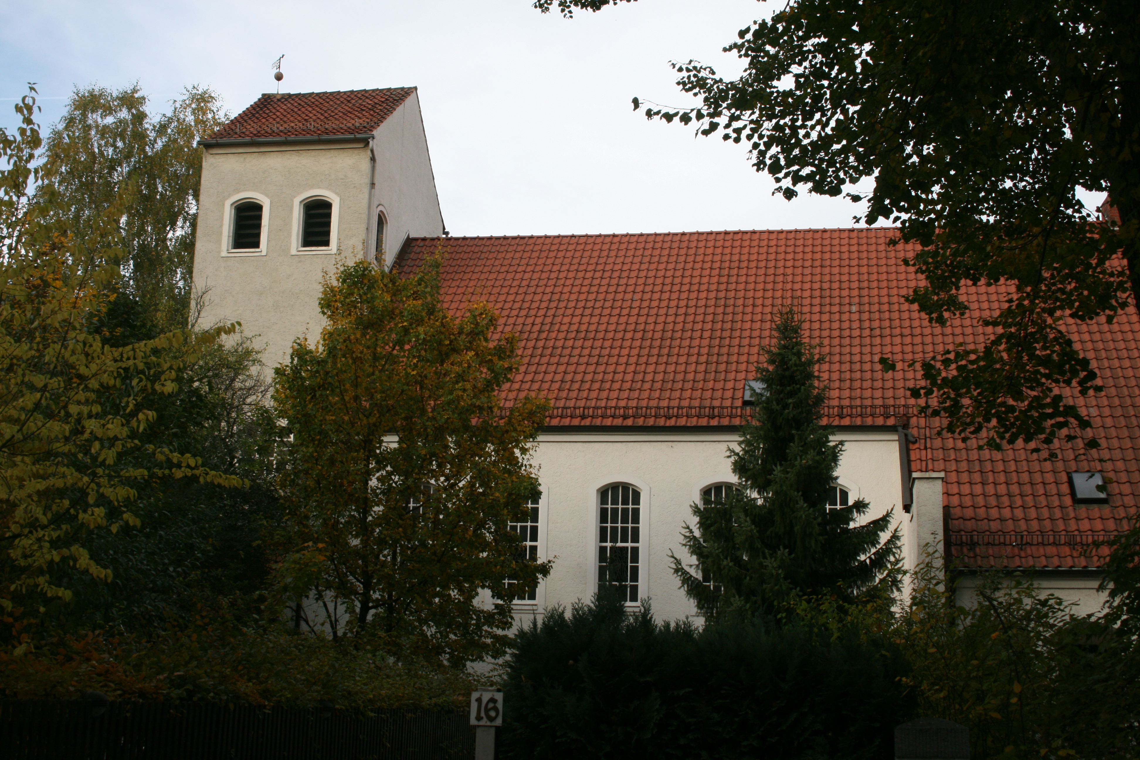 Die Gethsemanekirche Hannover-List, Hebbelstr. 16, wurde 1937 gebaut.